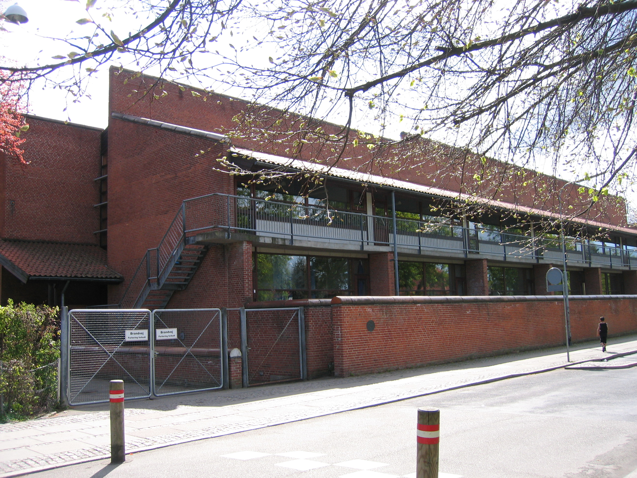 Johannesskolen